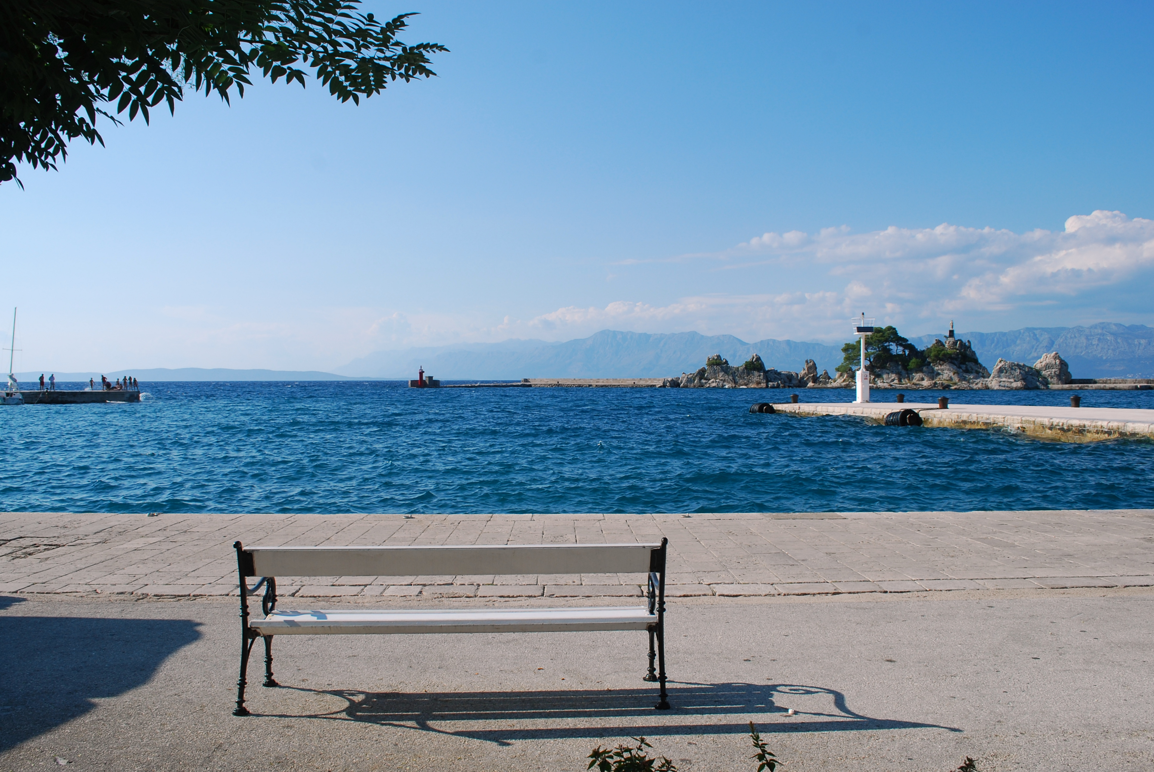 Marina Trpanj